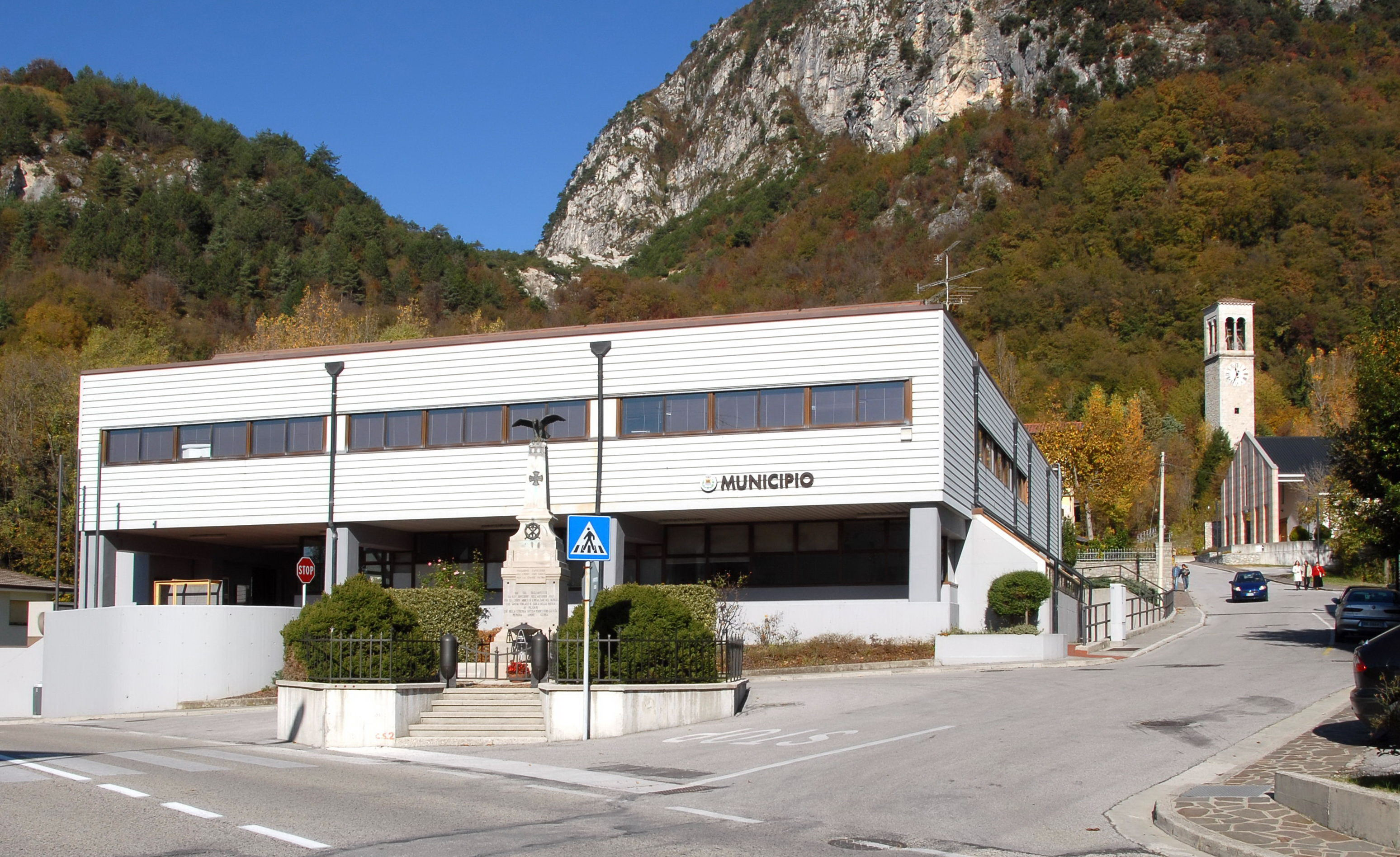 Municipal office at Trasaghis, province of Udine, region Friuli Venezia-Giulia, Italy